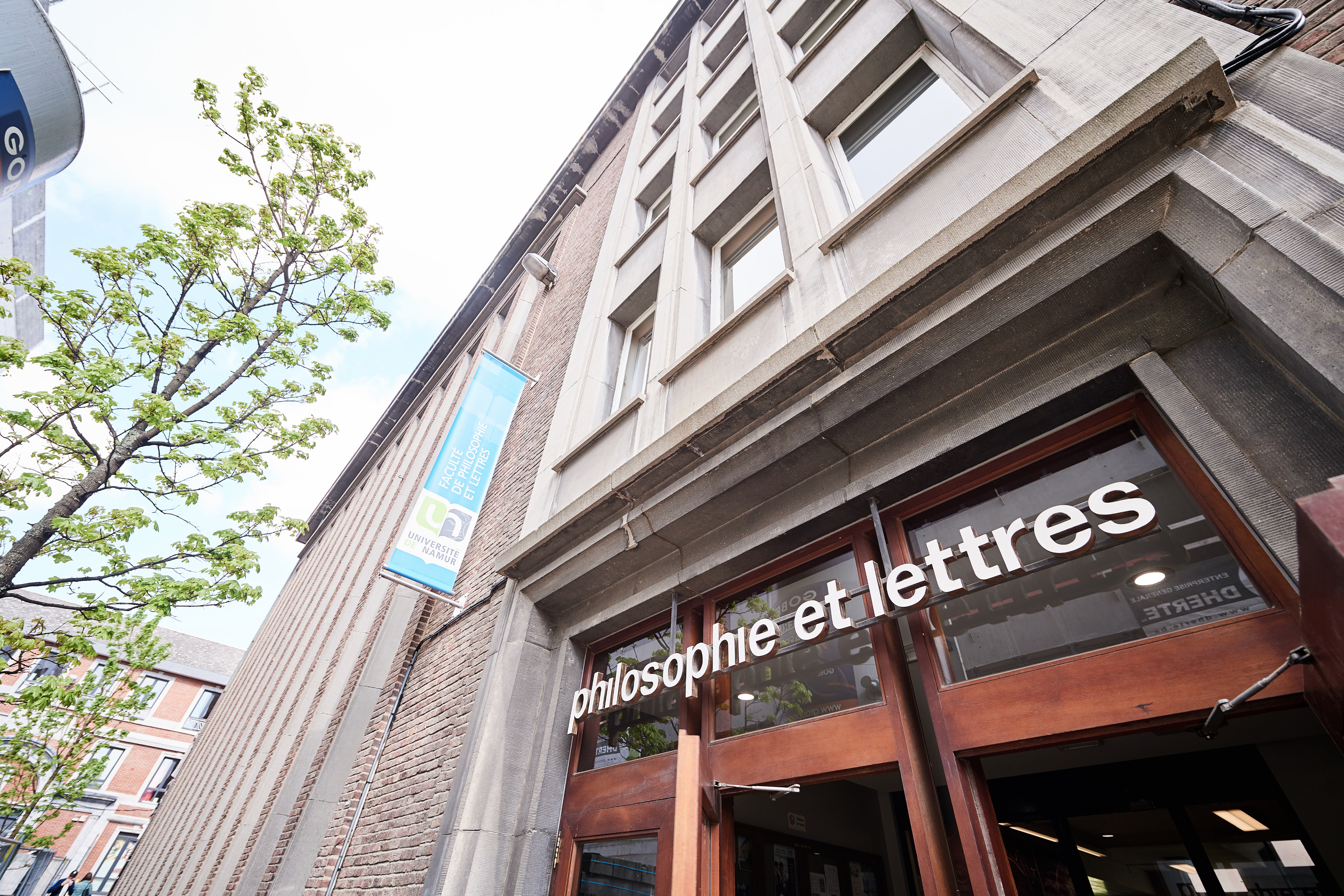 © UNamur - Benjamin Brolet